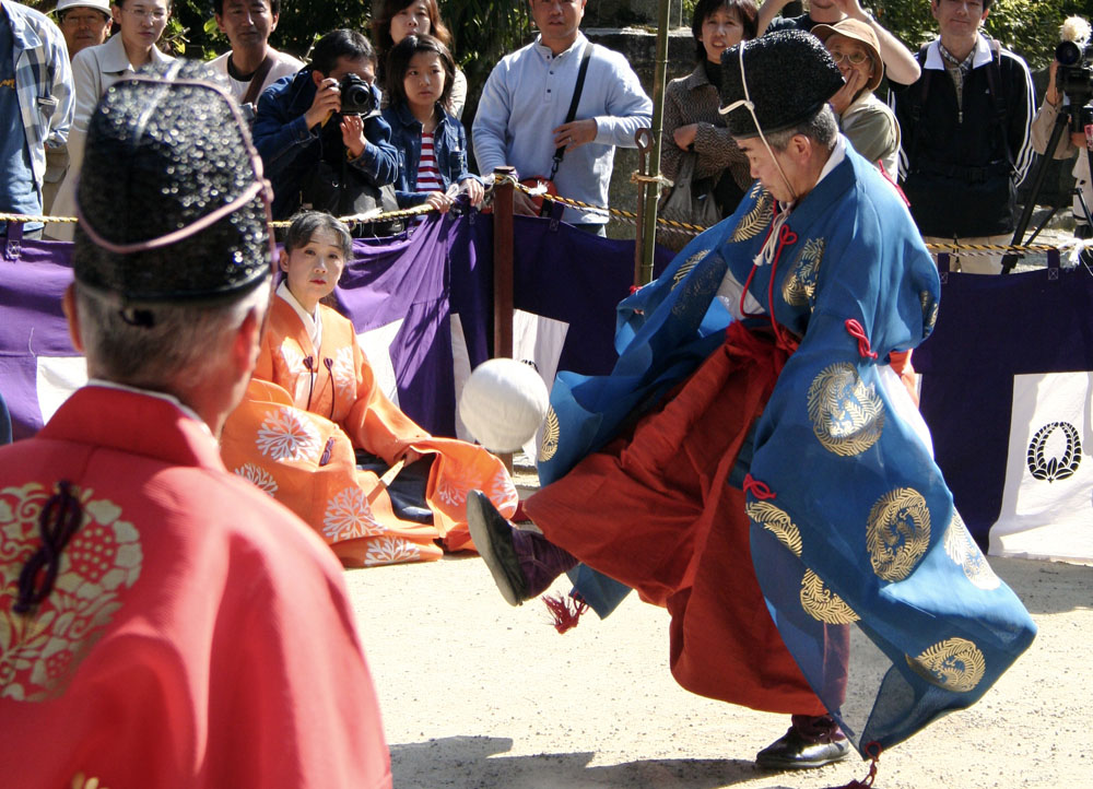 Kemari Matsuri at Tanzan Shrine